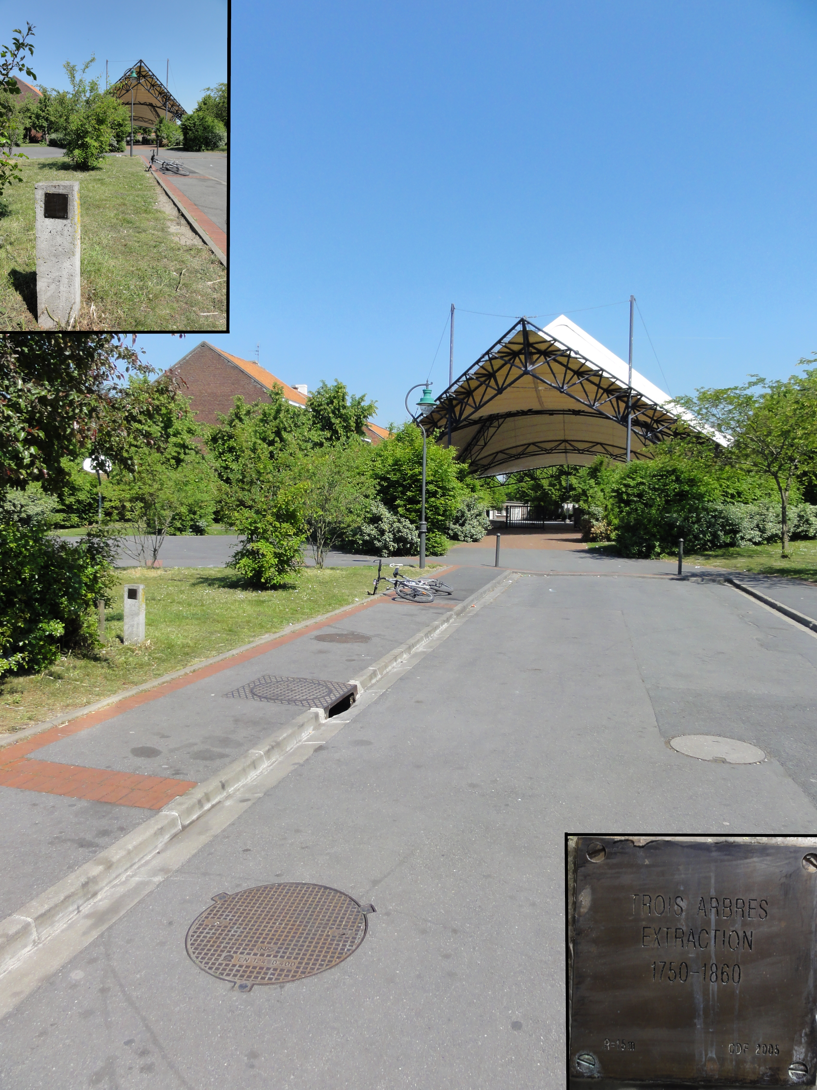 La Fosse Trois Arbres de la Compagnie des mines d'Anzin était un charbonnage constitué de deux puits situé à Vieux-Condé, Nord, Nord-Pas-de-Calais, France.